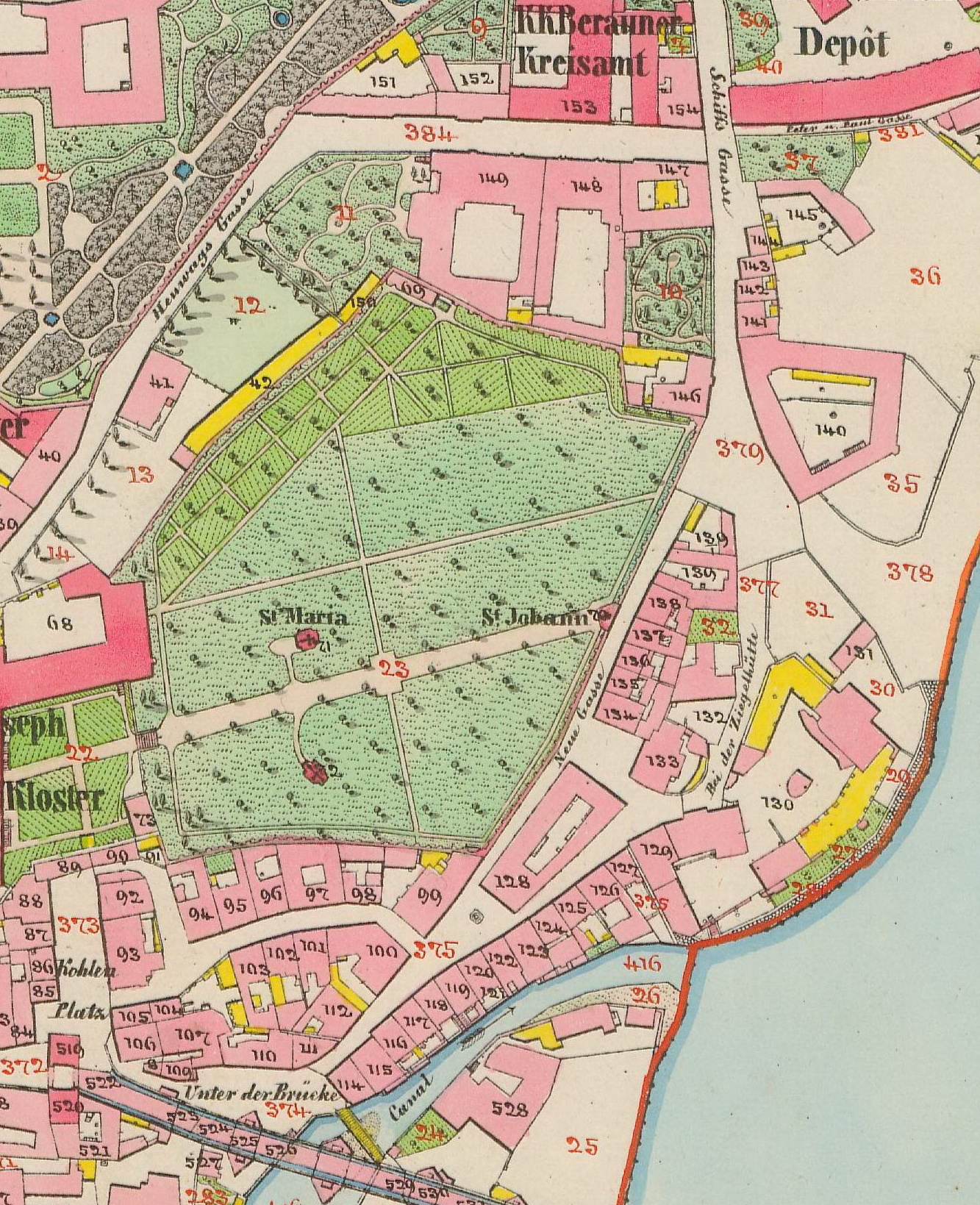 Prostor dnešní ulice U Lužického semináře na mapě Stabilního katastru (mapový list 6068-1-002)